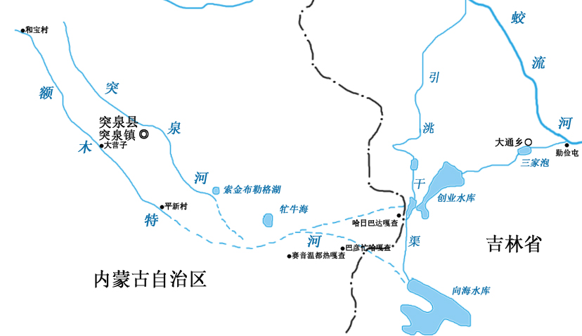 额木特河示意图，依照《中国河湖大典·黑龙江、辽河卷》 中的资料绘制。